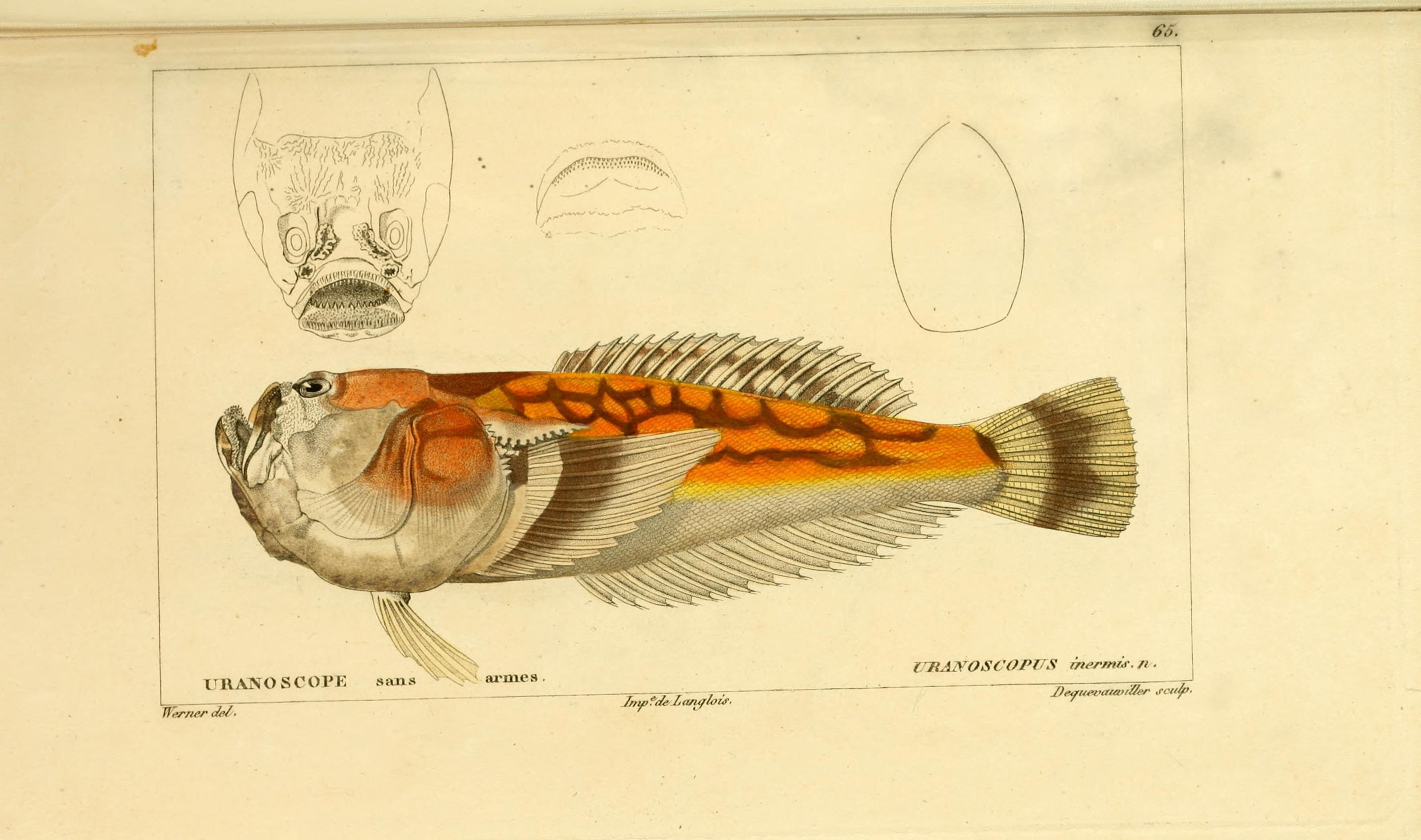 Ichthyscopus lebeck syn. Uranoscopus inermis Histoire naturelle des poissons / par m. le bon Cuvier ... et par M. Valenciennes.